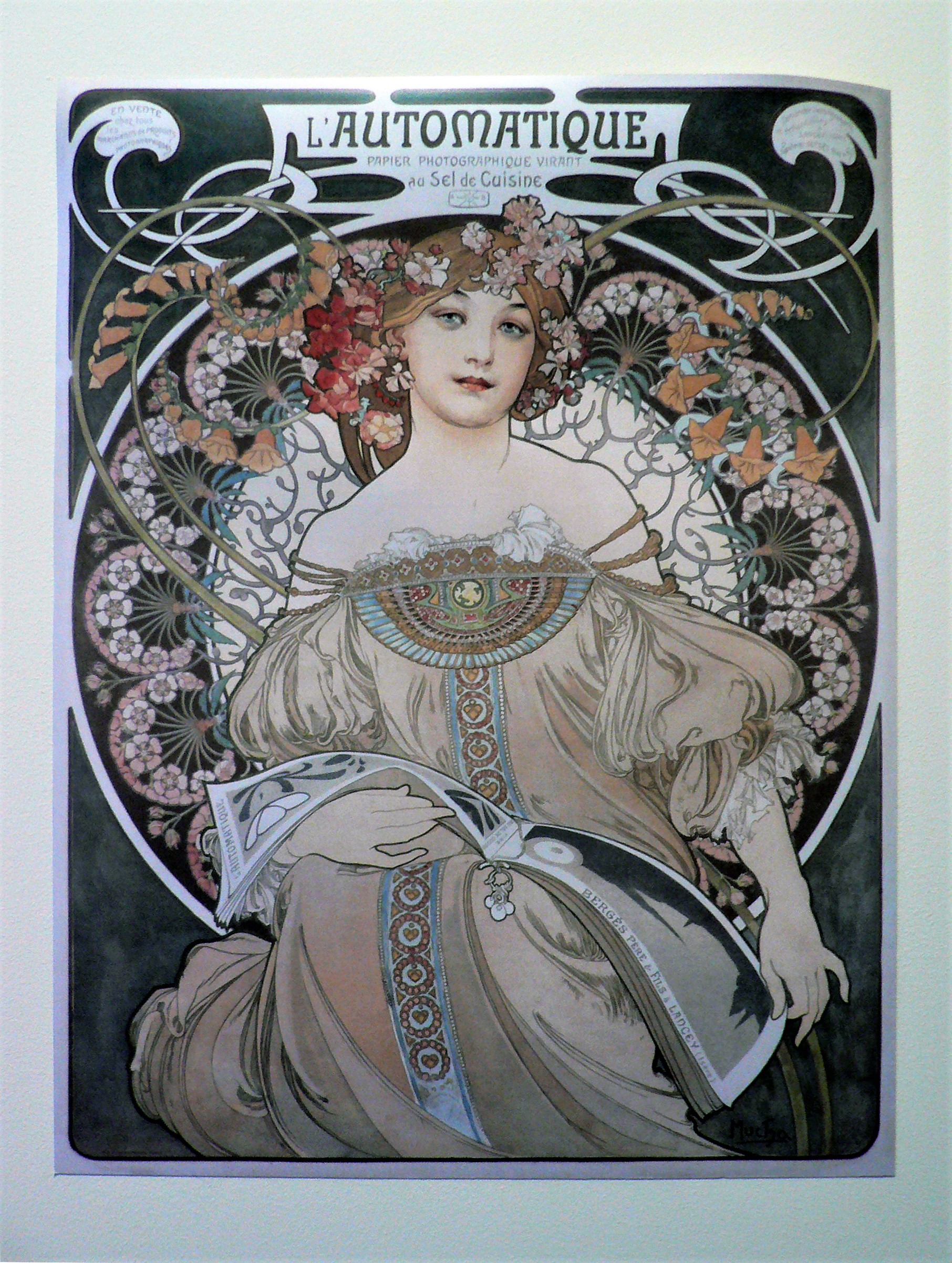 Œuvre de A. Mucha pour l'innovative tirage sur papier salé, papier spécial photographique produit dans l'usine papetière Bergès de Lancey : "L'automatique, papier photographique virant au sel de cuisine". Affiché à l'exposition « Alfons Mucha et les Bergès : une amitié », au musée de la Houille blanche du 27 avril au 16 septembre 2018. Maison Bergès, Lancey, Villard-Bonnot, Isère, AuRA, France.